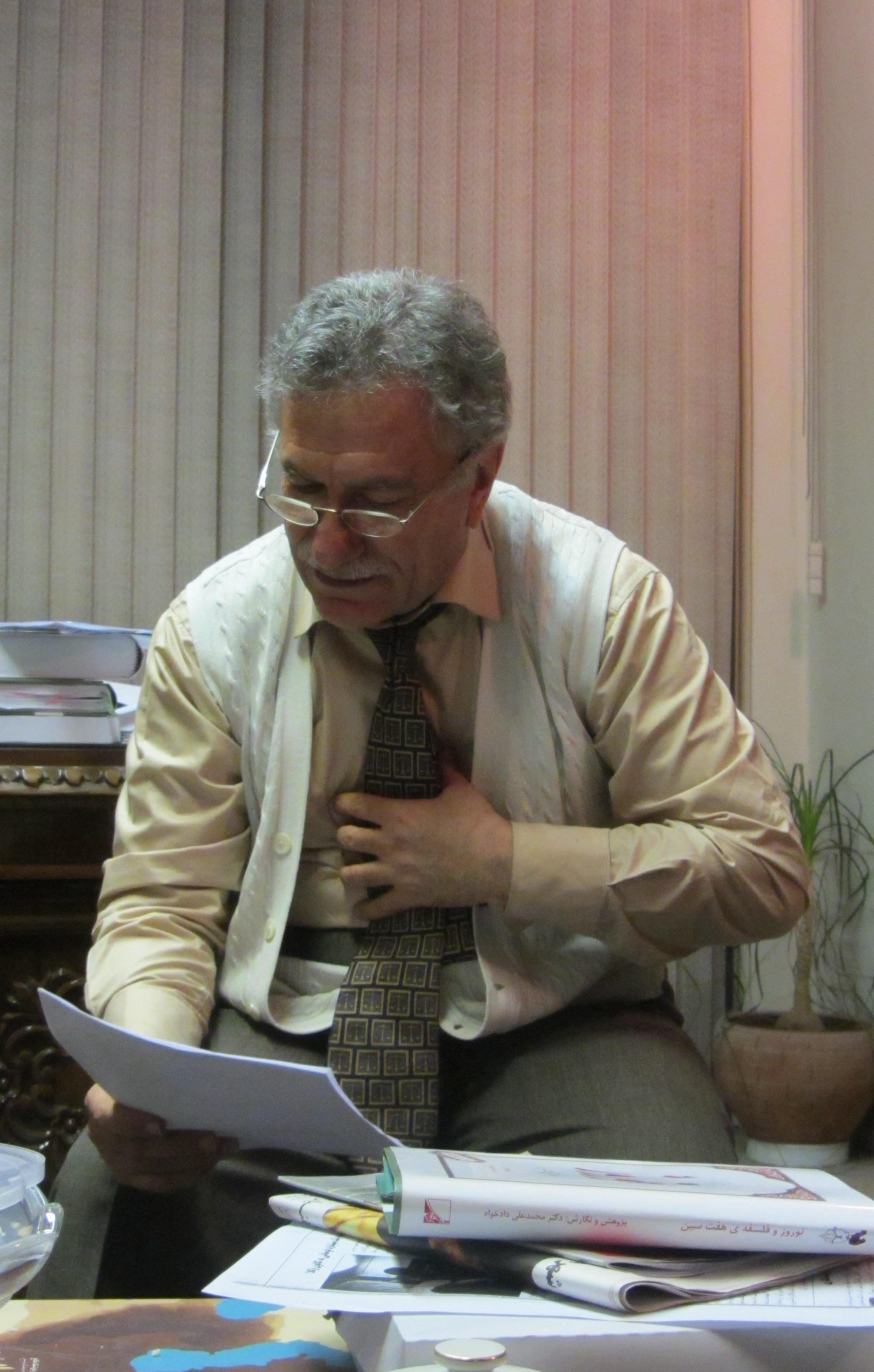 محمد علی دادخواه